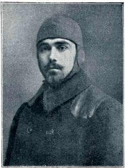 Edvard Rusjan